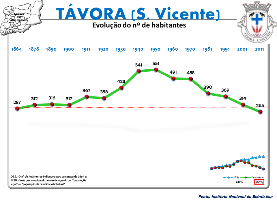 Censos 1864/2011